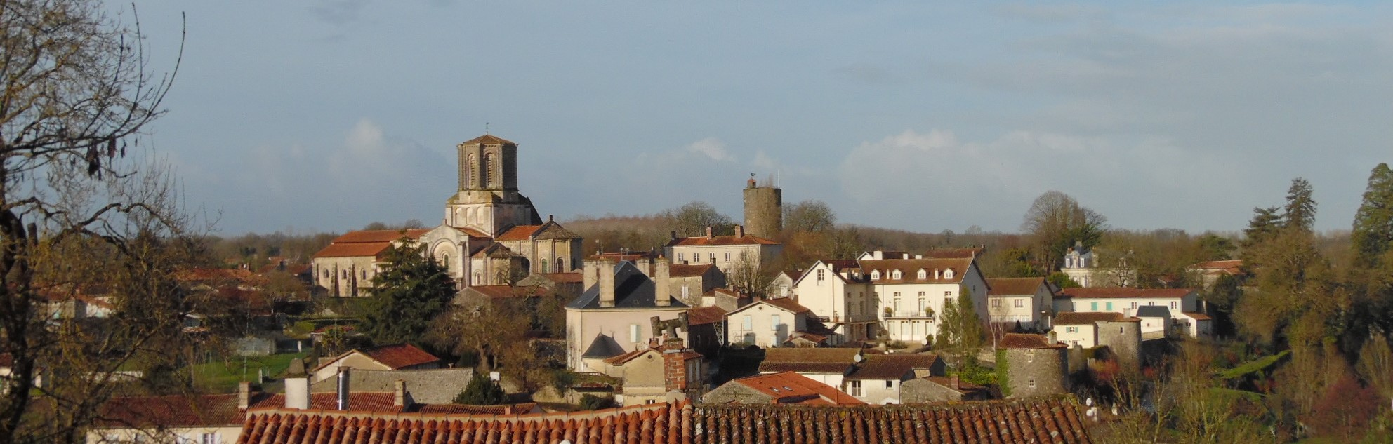 Vue générale de la cité médiévale : église, tour Mélusine et remparts est. Photo prise en hiver depuis le calvaire de Montfort localisé au sud-est de la cité.